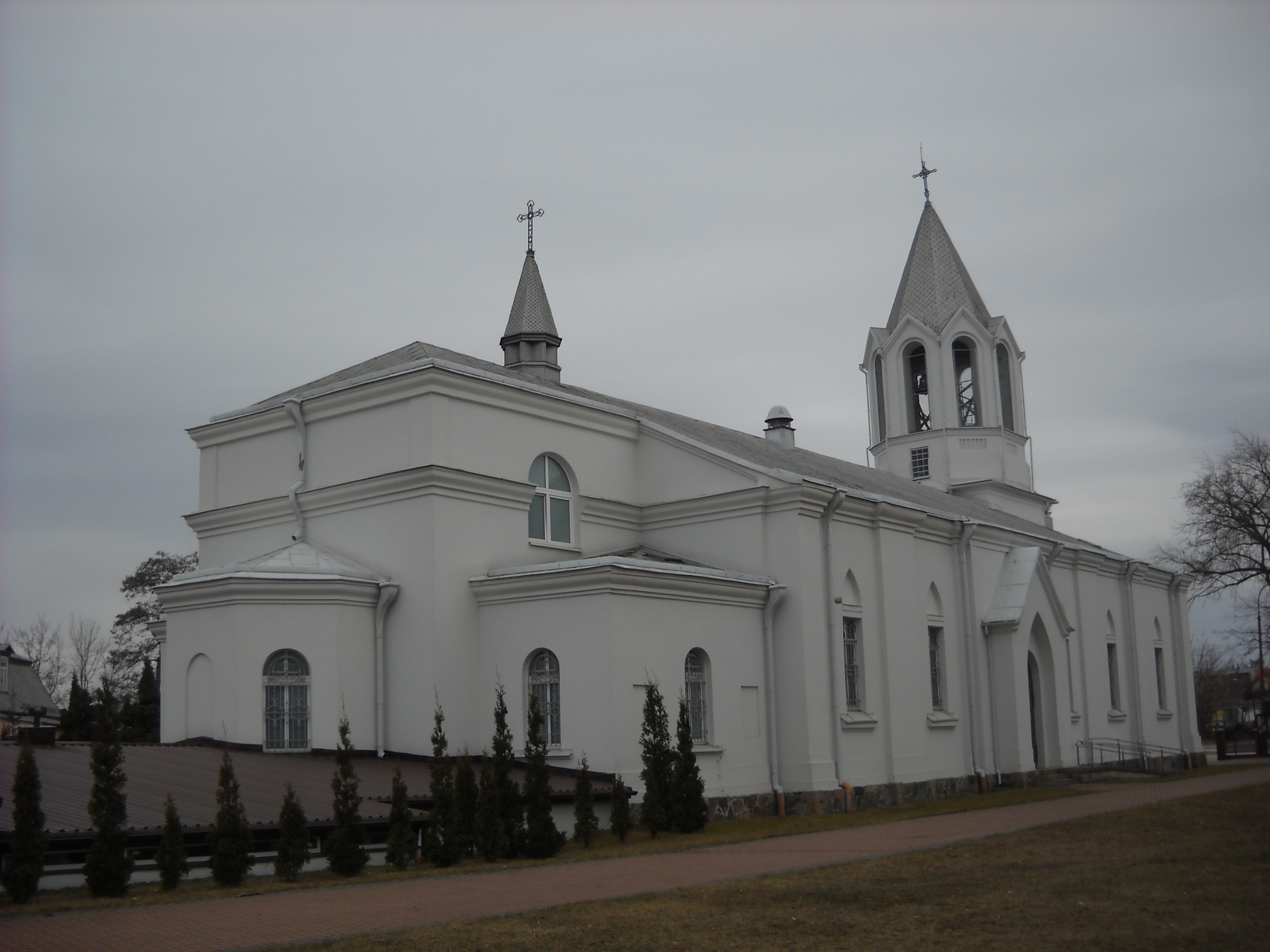 Kościół Najświętszego Serca Jezusa w Białymstoku, dawna cerkiew Kazańskiej Ikony Matki Bożej